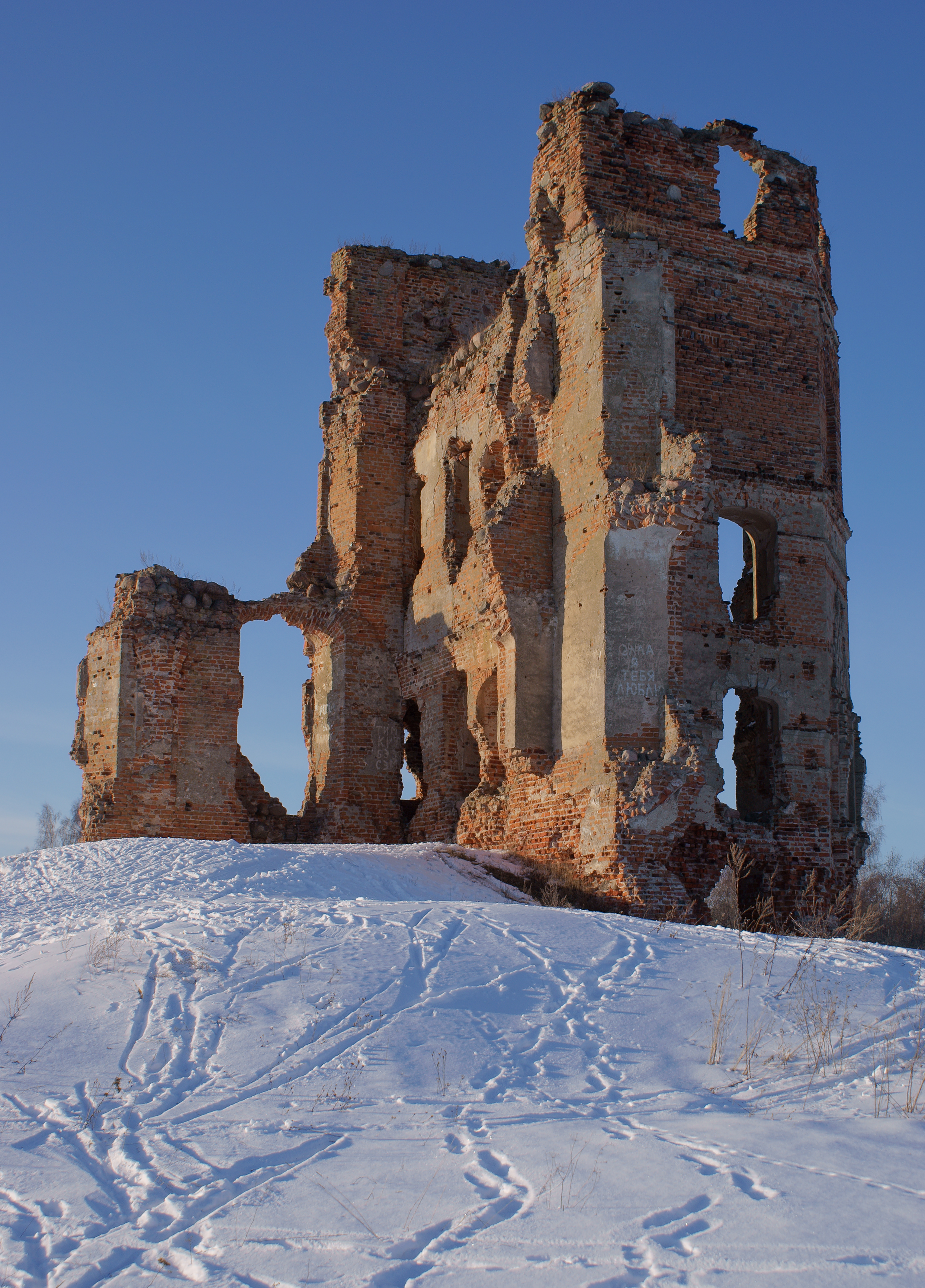 Руины замка «Белый ковель» в Смолянах This is a photo of Belarusian heritage monument. Reference number: 212Г000139 ( WLM)